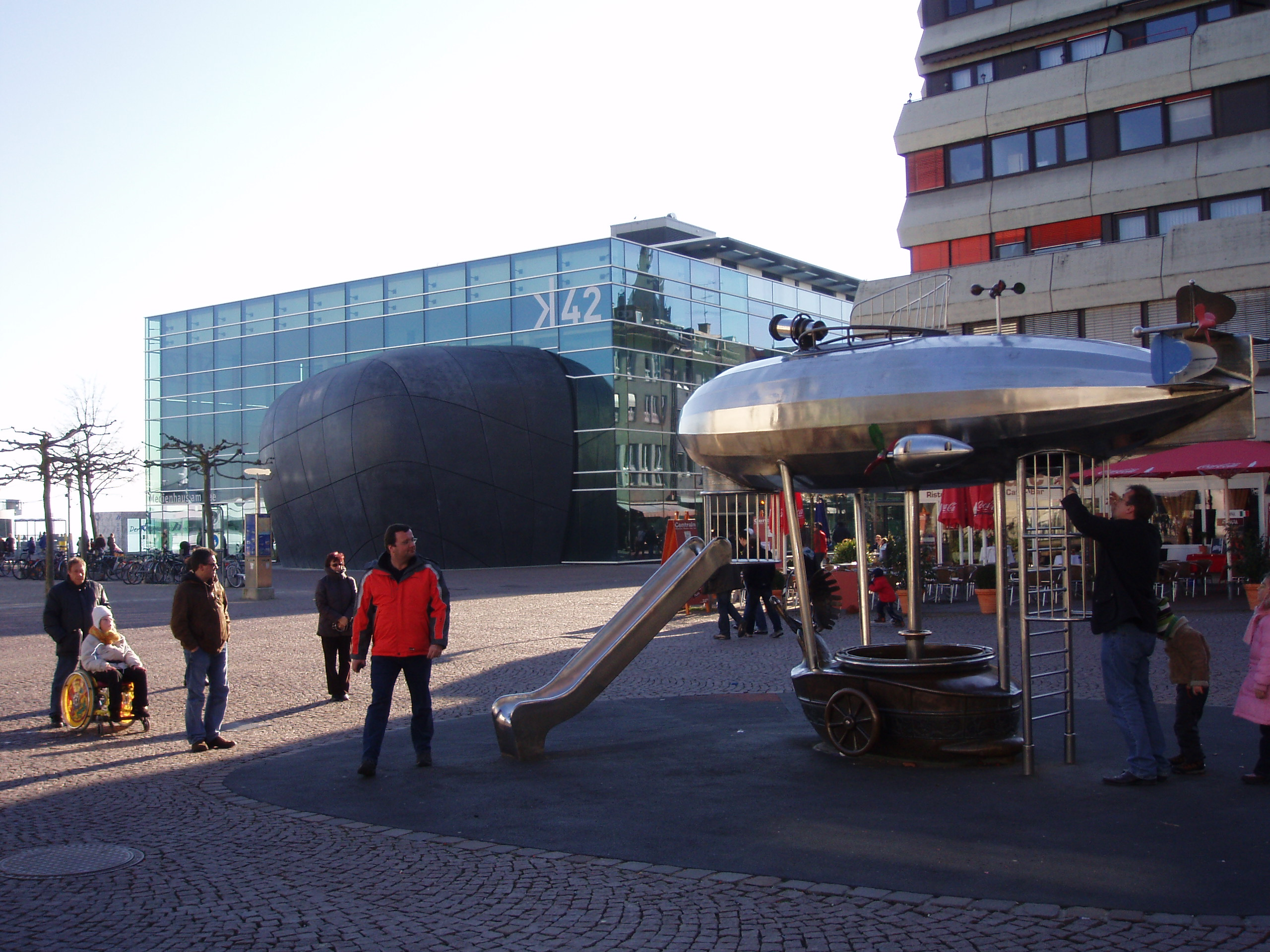 Spielgerät in Zeppelinform zwischen dem K42 und dem Zeppelinmuseum in Friedrichshafen